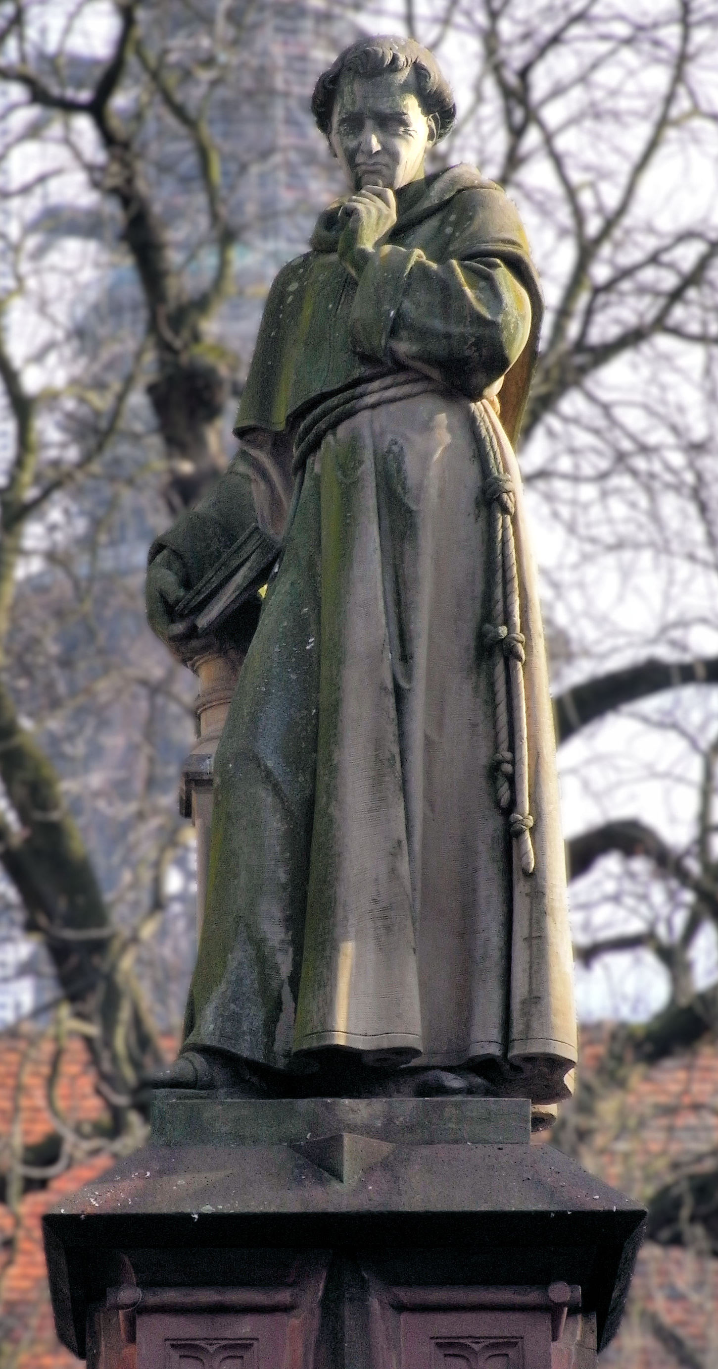 Brunnen für Berthold Schwarz am Rathaus Freiburg